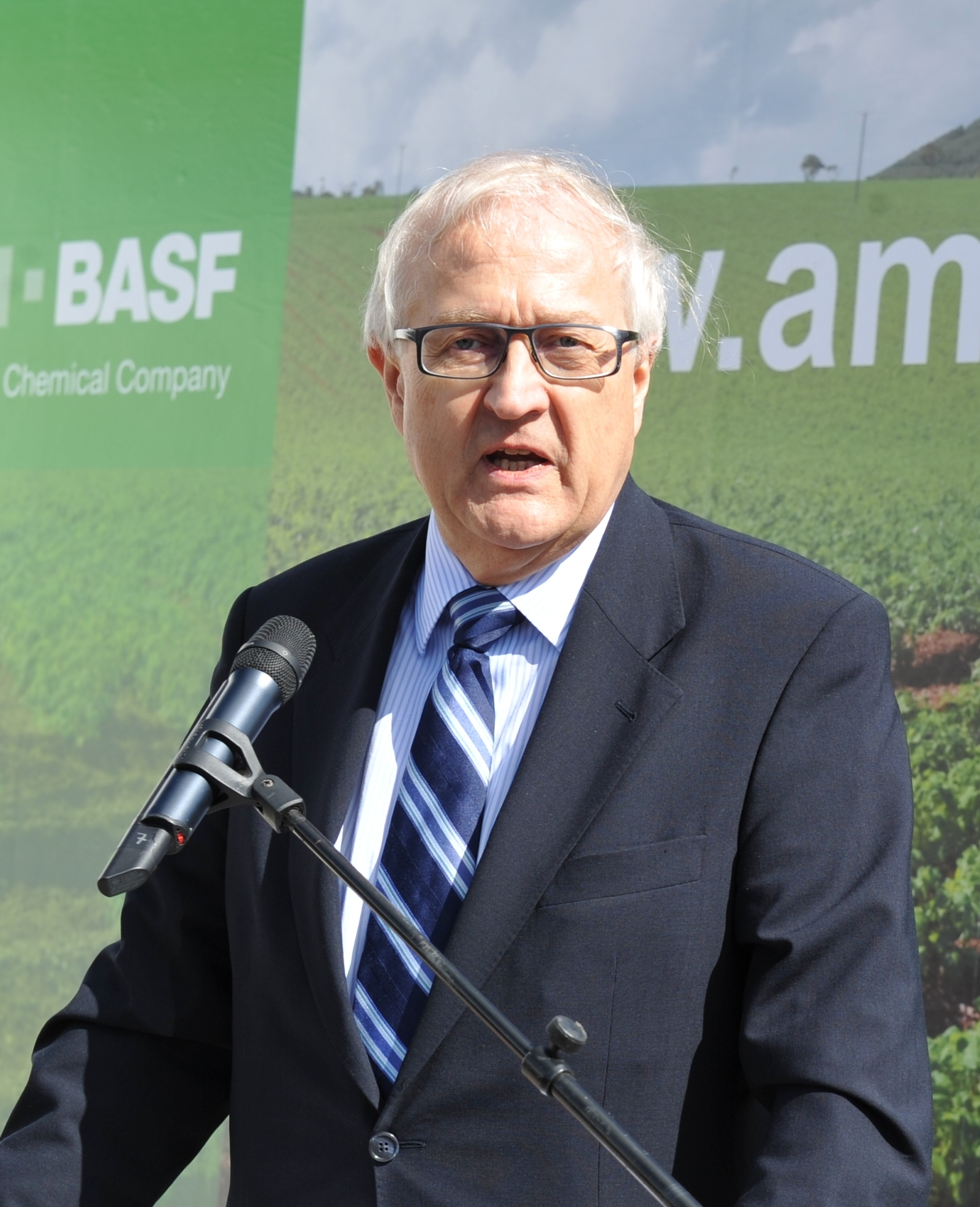 Rainer Brüderle, 2010.